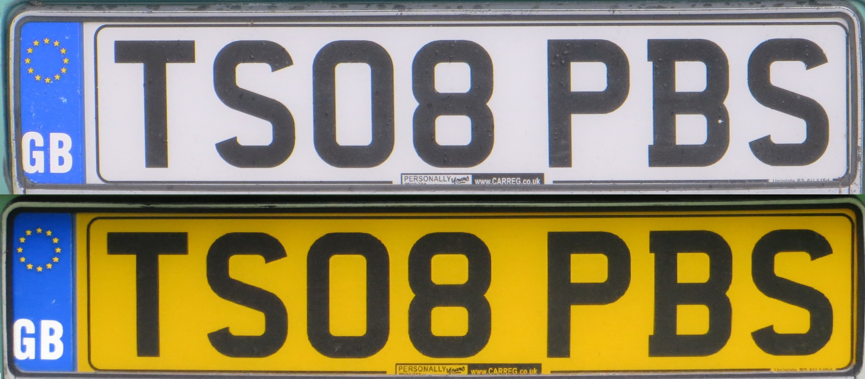 kentekenplaat voor en achter uit Groot Brittannië